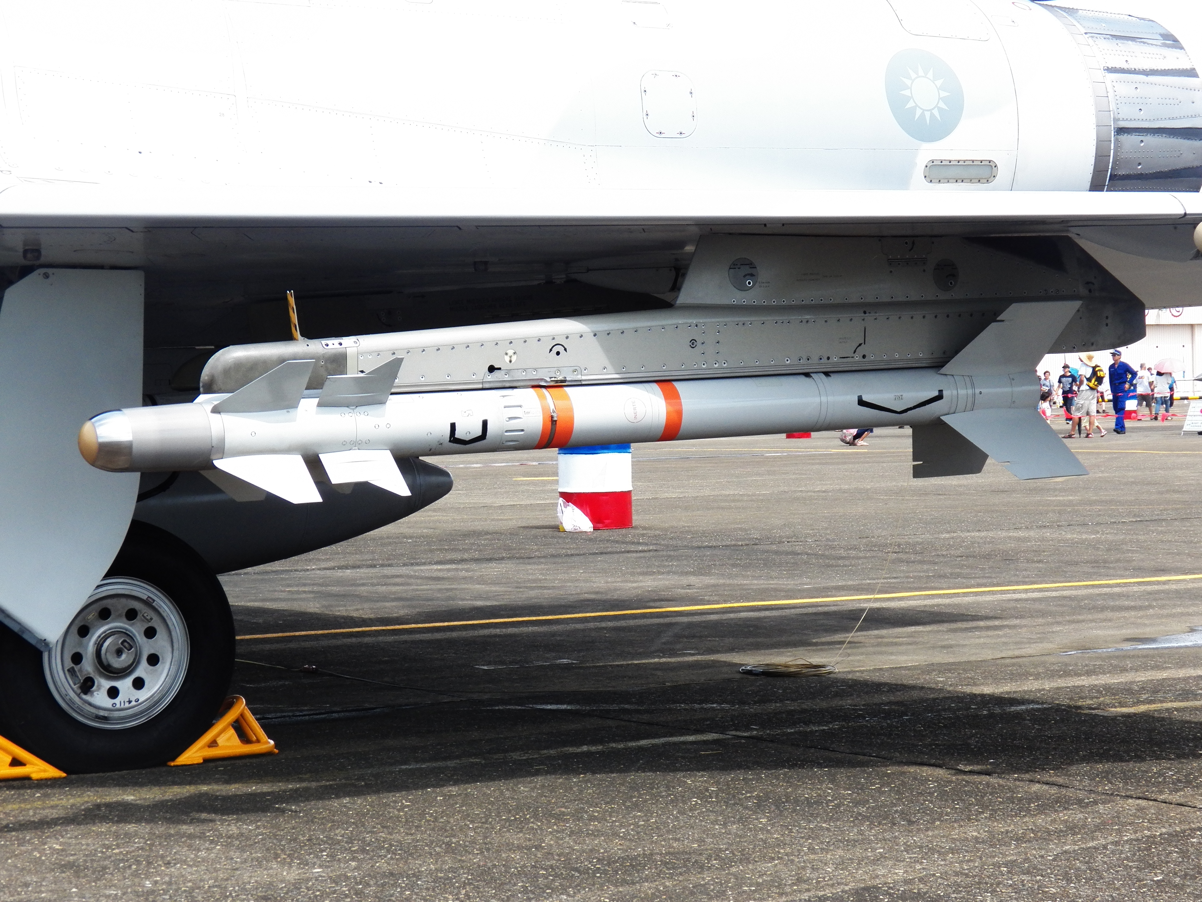 中華民國空軍幻象499聯隊2000-5EI 2046左翼掛架下的魔術二型對空飛彈，攝於2012年空軍嘉義基地營區開放活動。